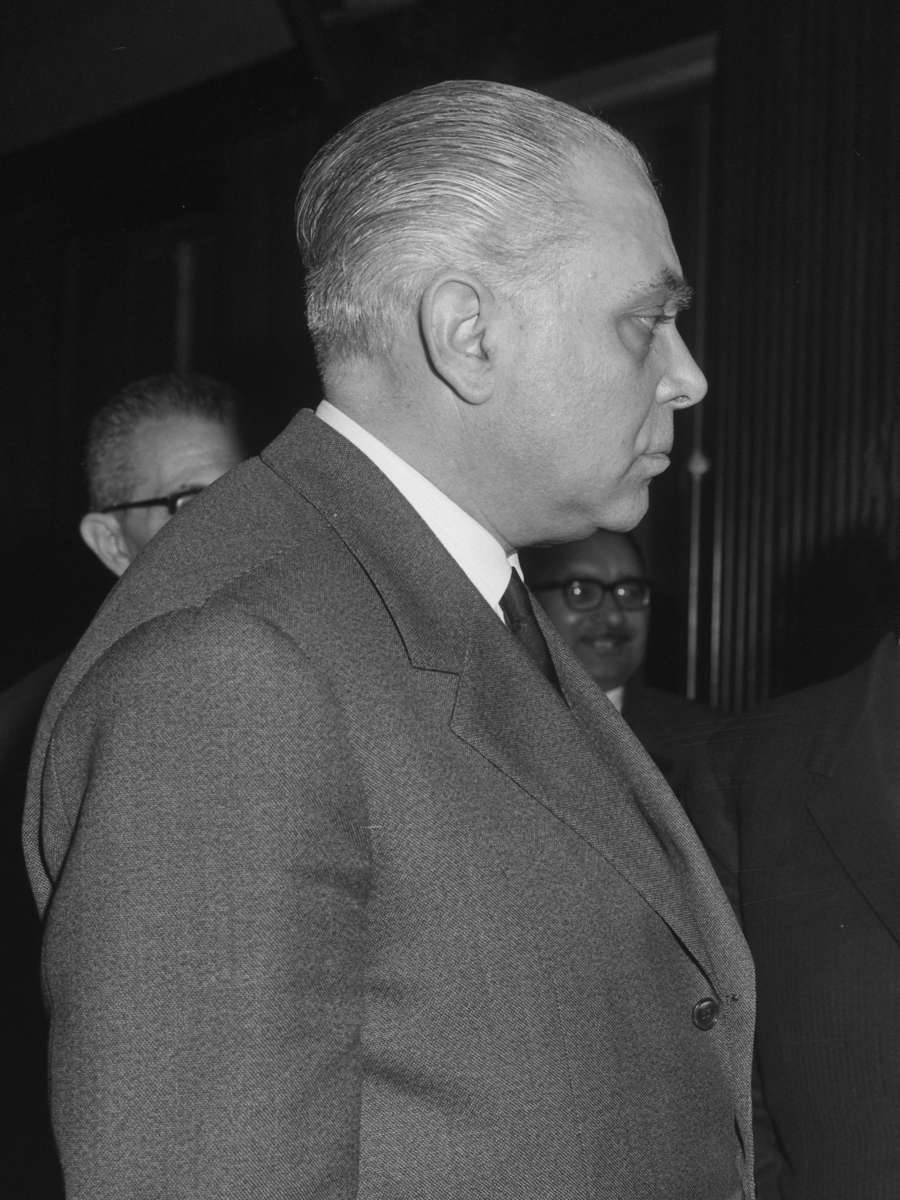 Ministerraad van de EEG te Brussel bijeen gekomen. Bernardo Mattarella (minister van landbouw, Italie)